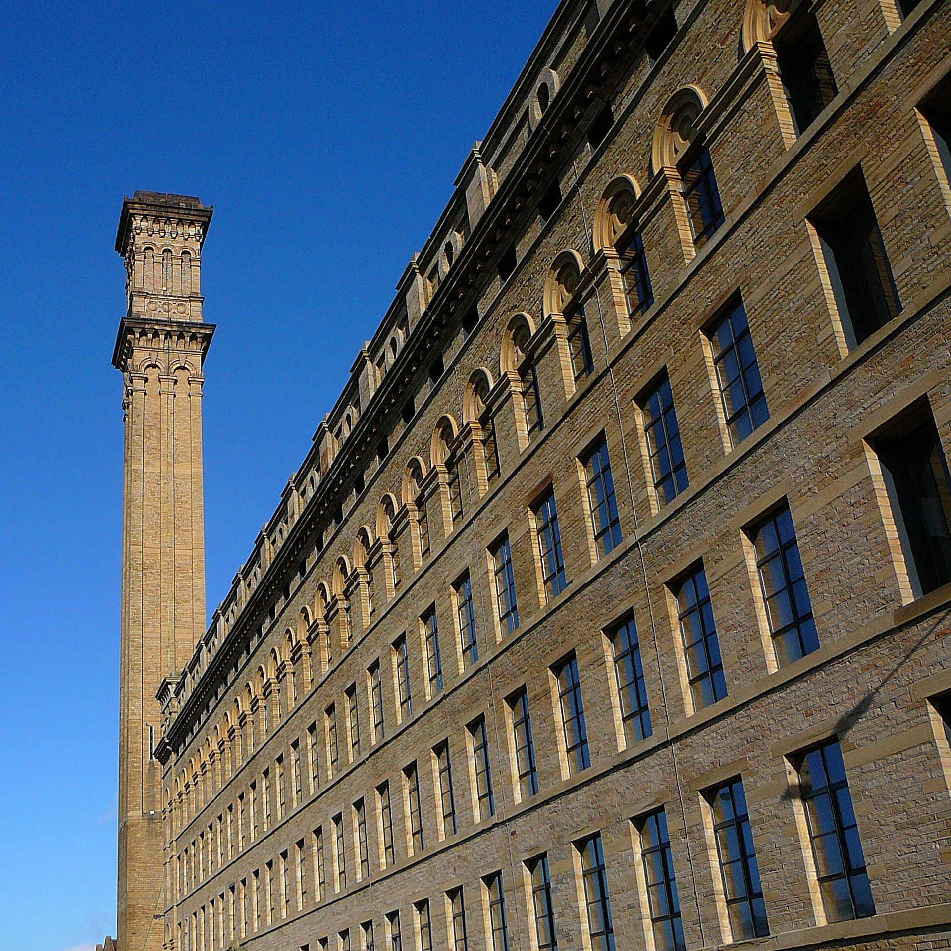 Manningham Mills a